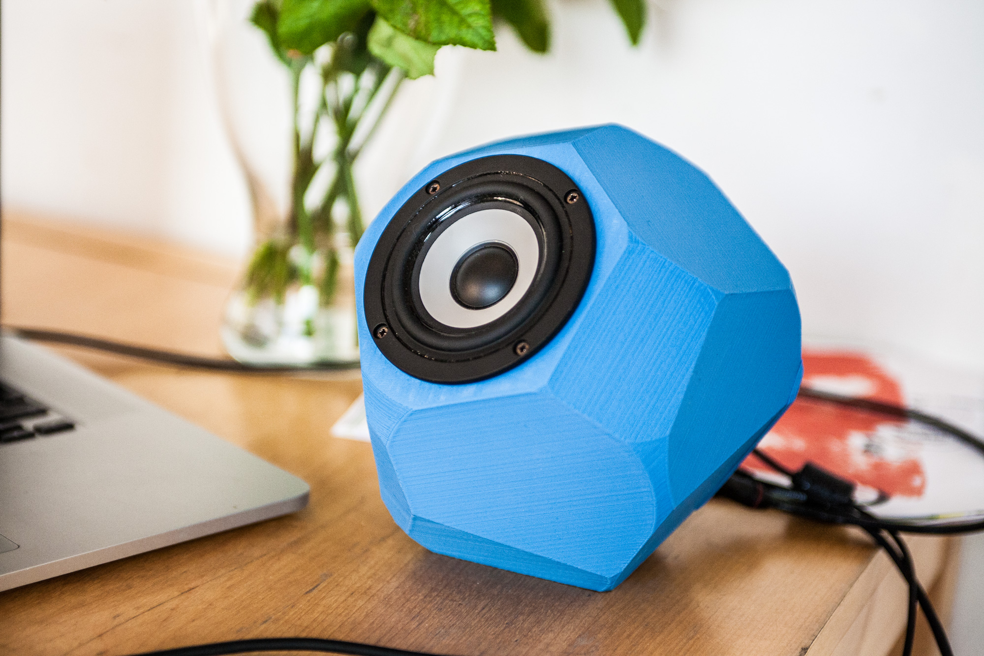 Lautsprecher aus 3D Drucker